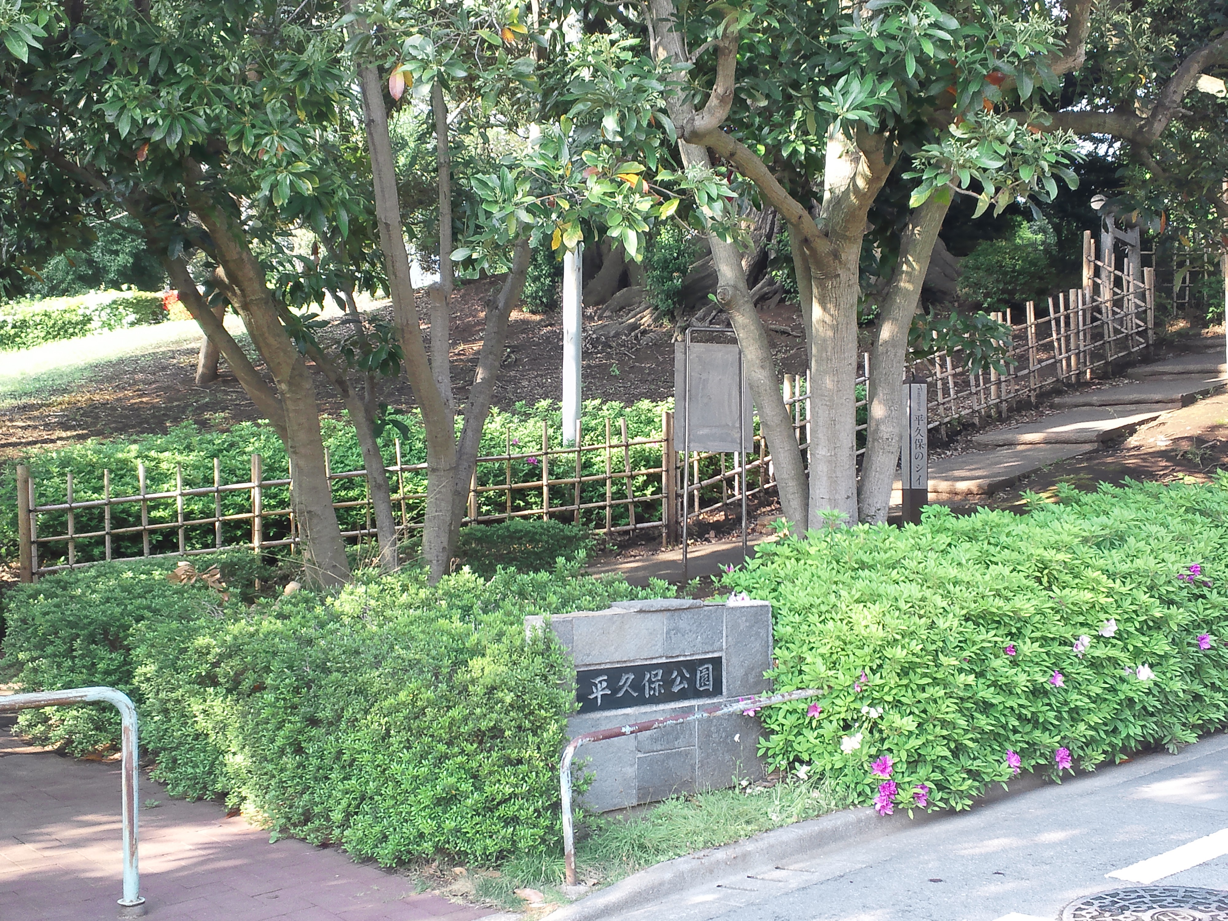 平久保（びりくぼ）公園（旧小野路町）